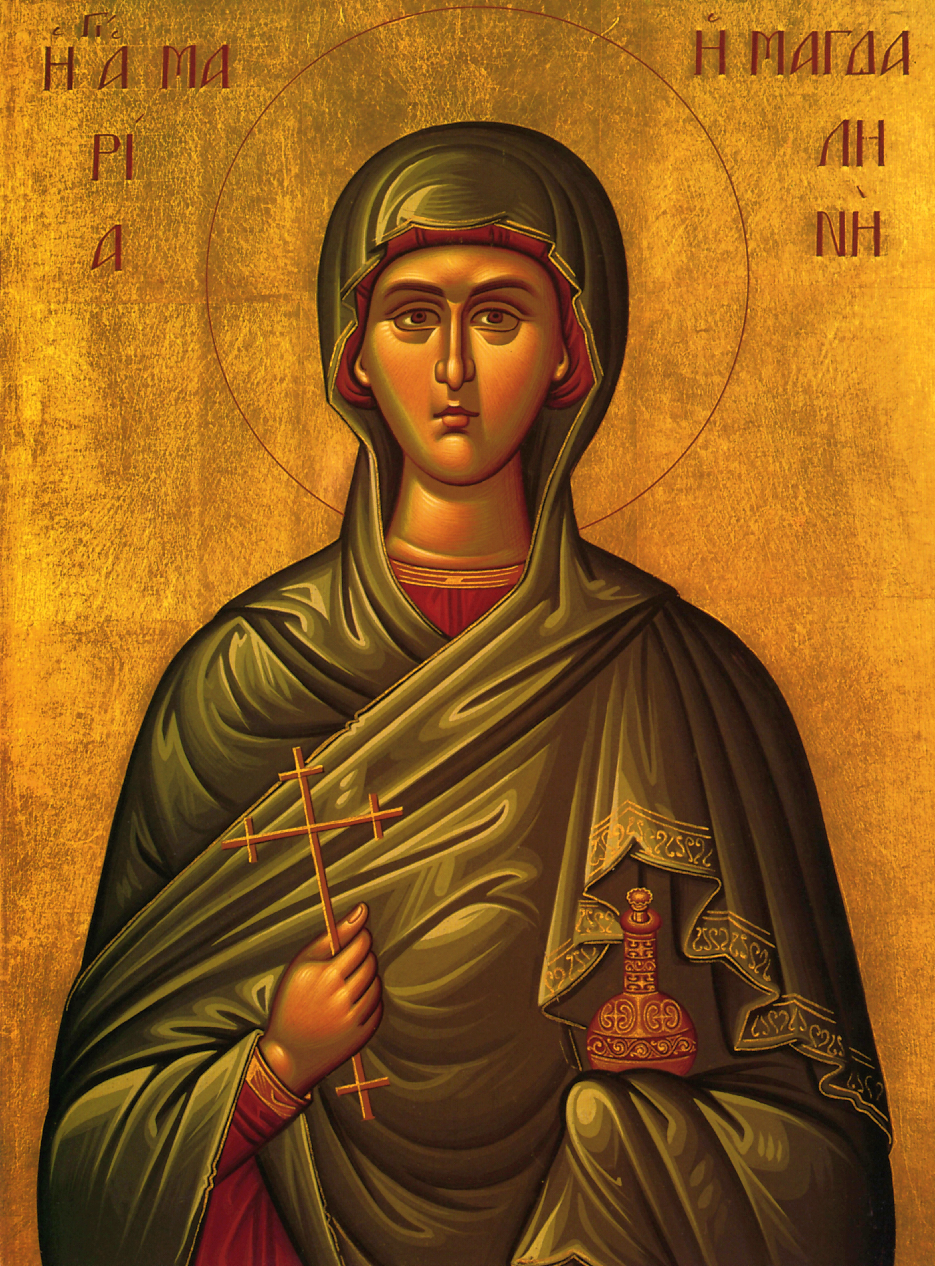 Αγία Μαρία η Μαγδαληνή.